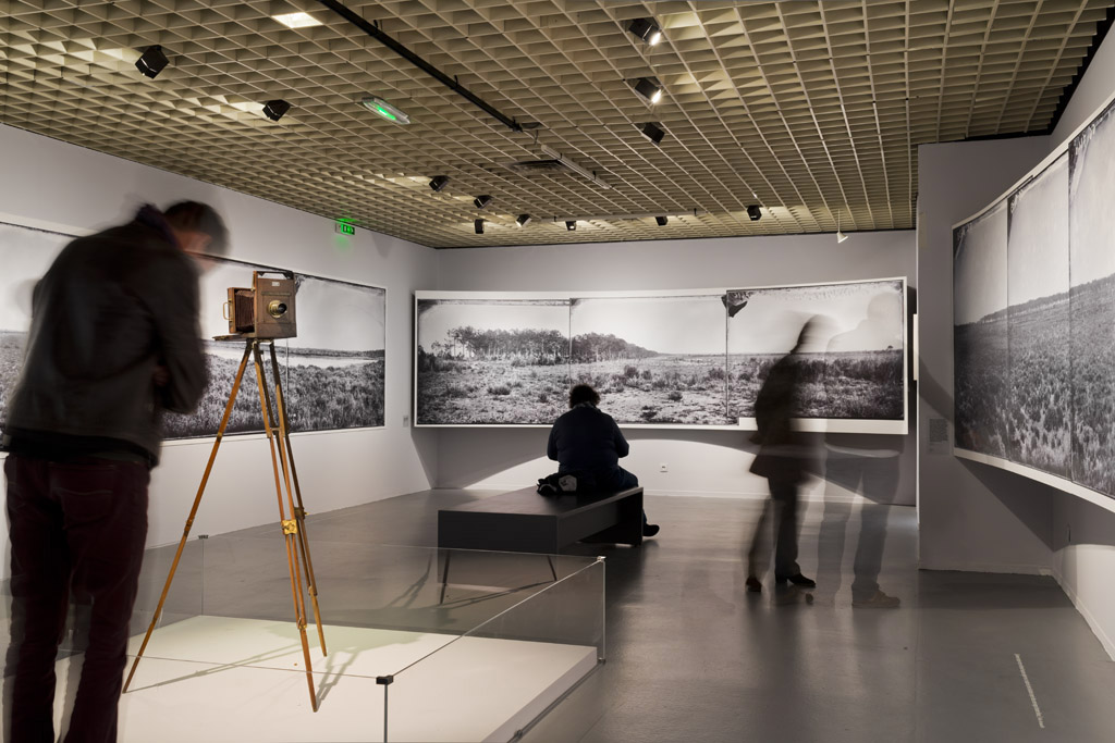 Exposition "Félix Arnaudin, le guetteur mélancolique" au Musée d'Aquitaine du 14 avril au 31 octobre 2015. Reconstitution d'une vue panomarique de la lande à partir des photographies de Félix Arnaudin.